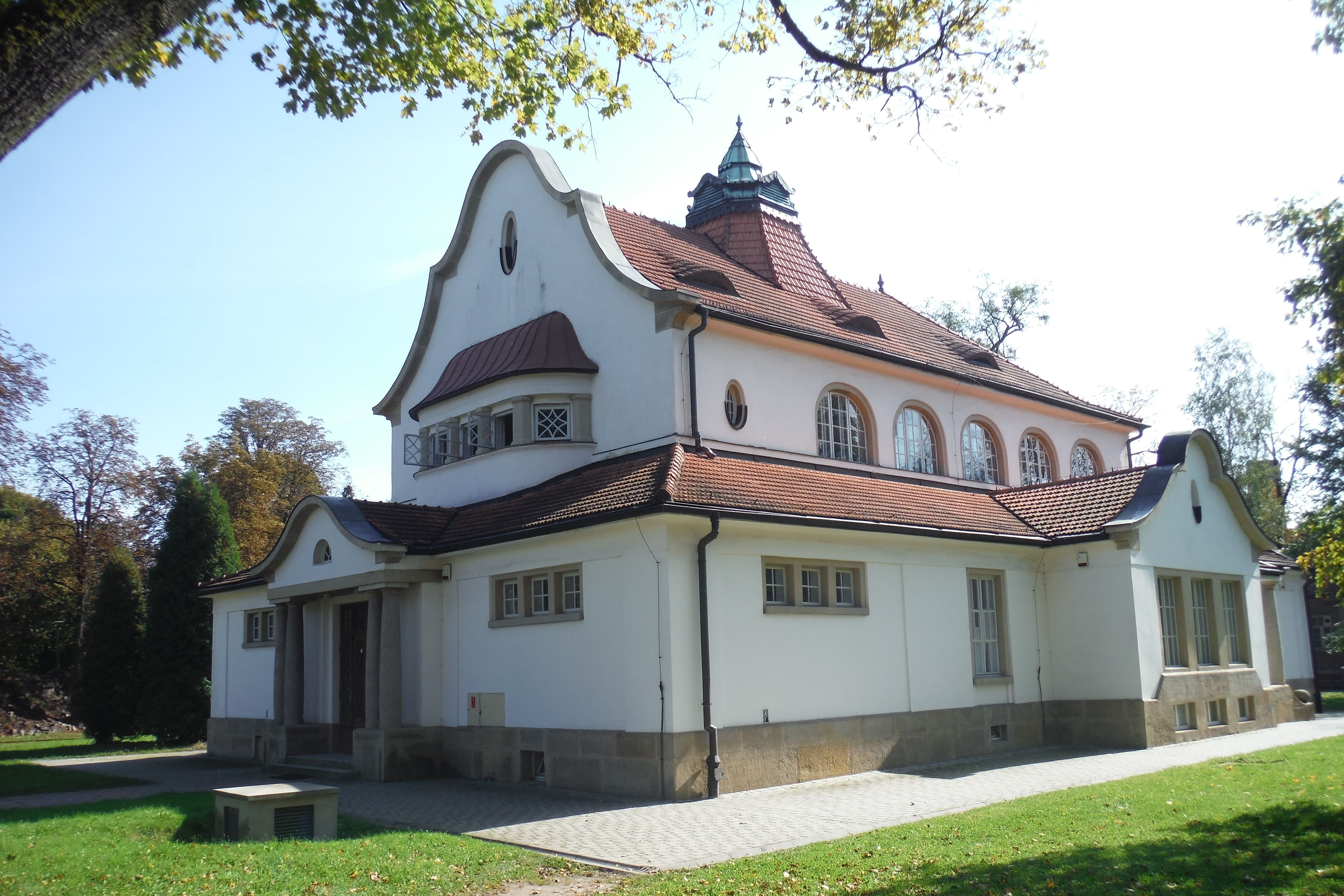 Kraków, Szpital im. Babińskiego, budynek przyzakładowgo teatru; pocz. XX